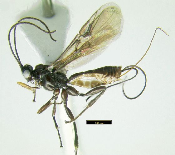 Lytopylus sp.